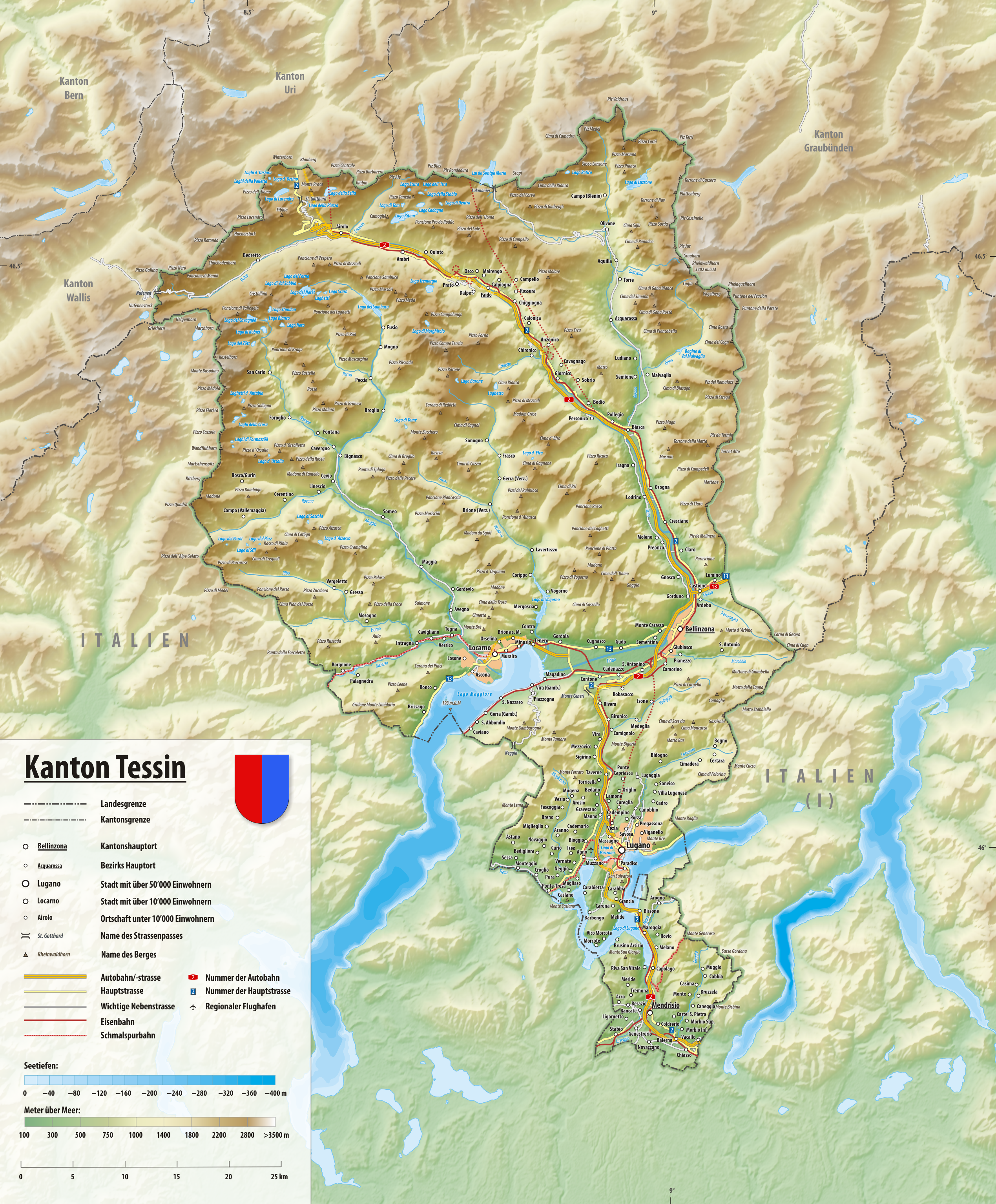 Reliefkarte des Kantons Tessin Topographischer Hintergrund: NASA Shuttle Radar Topography Mission (public domain). SRTM3 v.2.